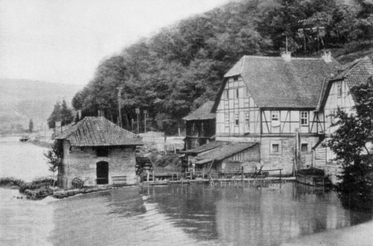 Blümer Mühle